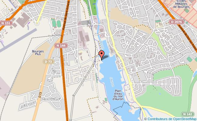 photo GPS du lac